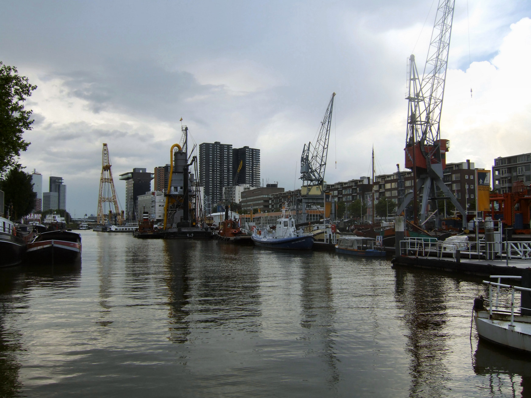 Leuvehaven in Rotterdam